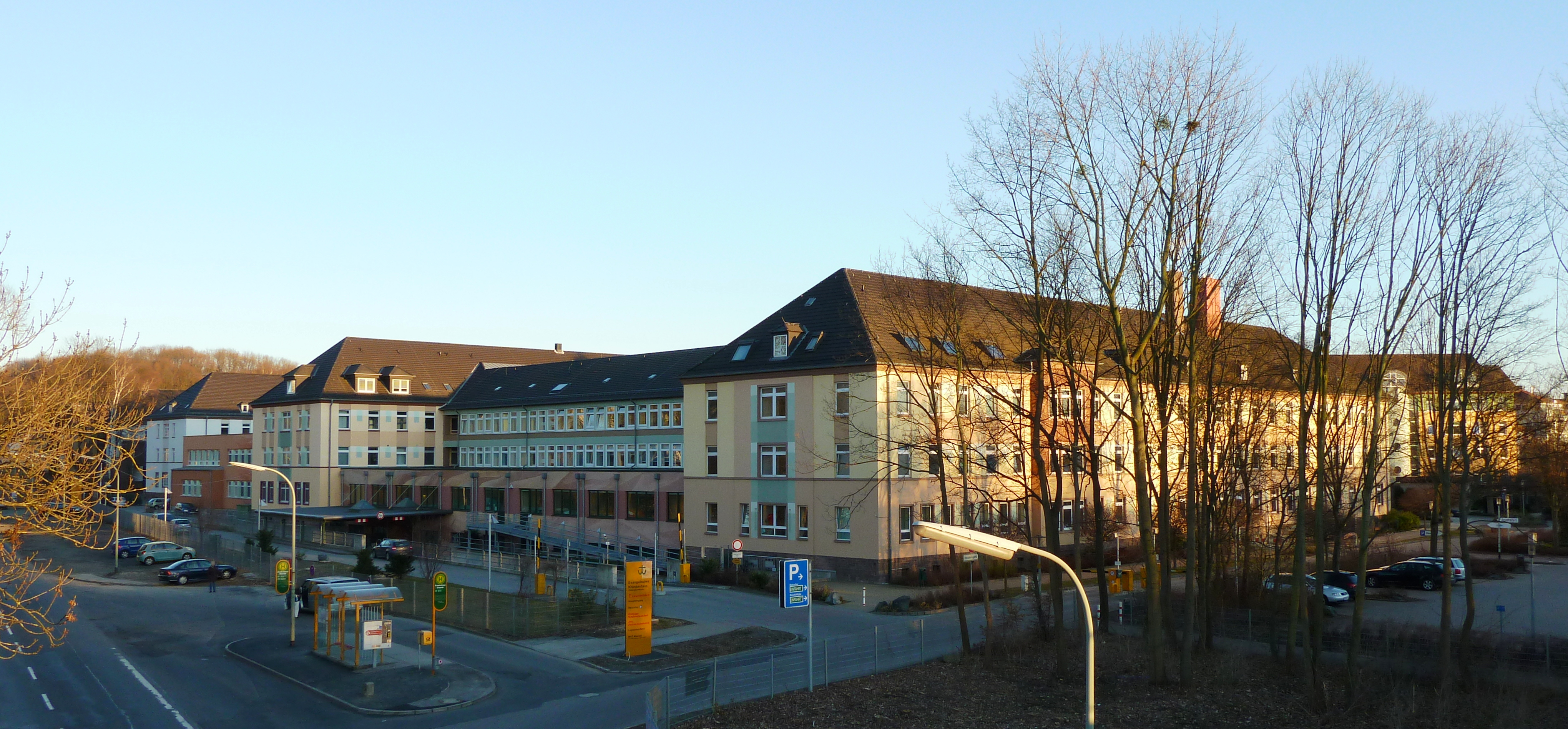 Blick von Nordwesten auf die Altbauten und den ehemaligen Haupteingang des Evangelischen Krankenhauses Göttingen-Weende